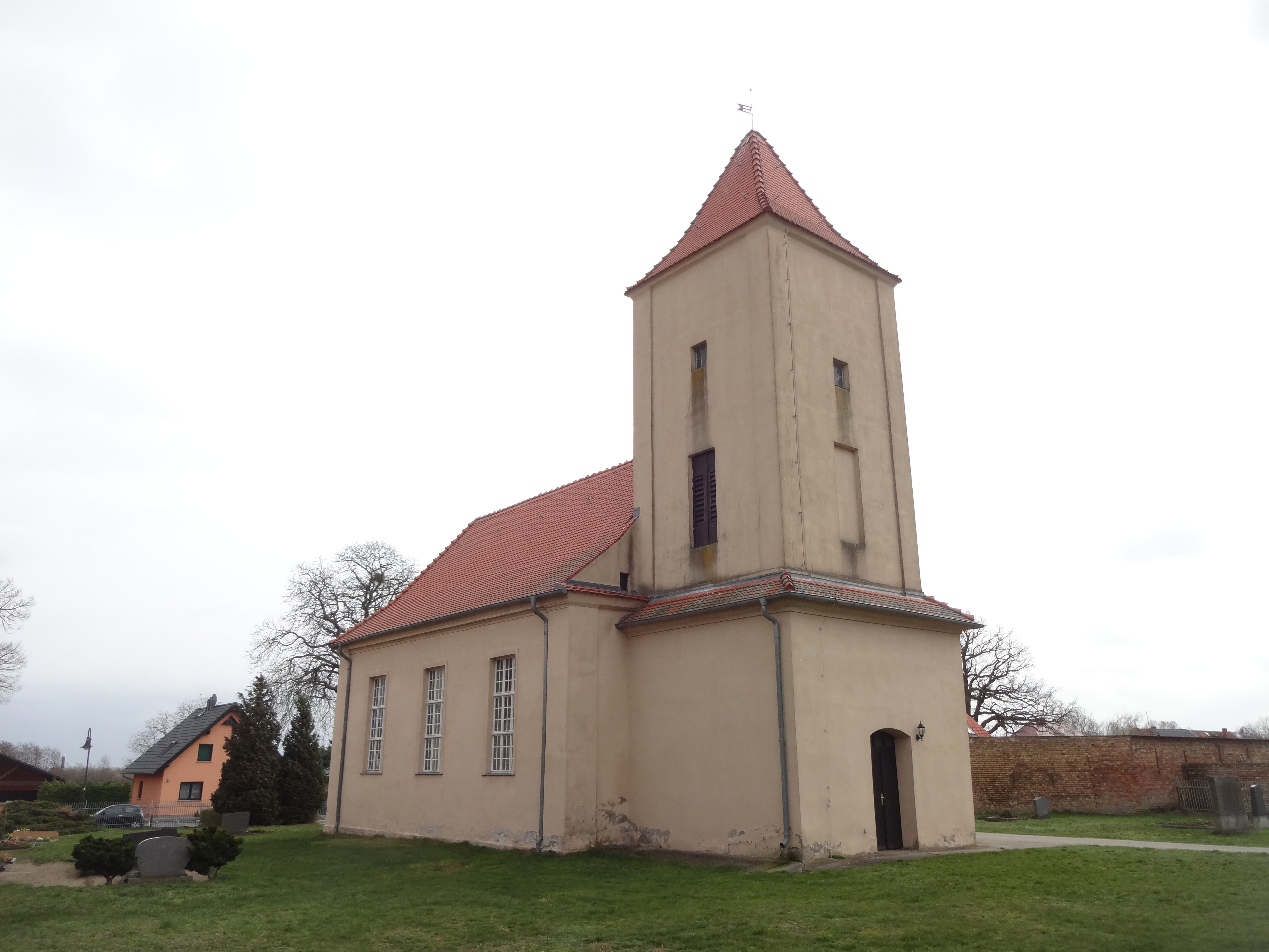 denkmalgeschützte Dorfkirche Rietz in Kloster Lehnin